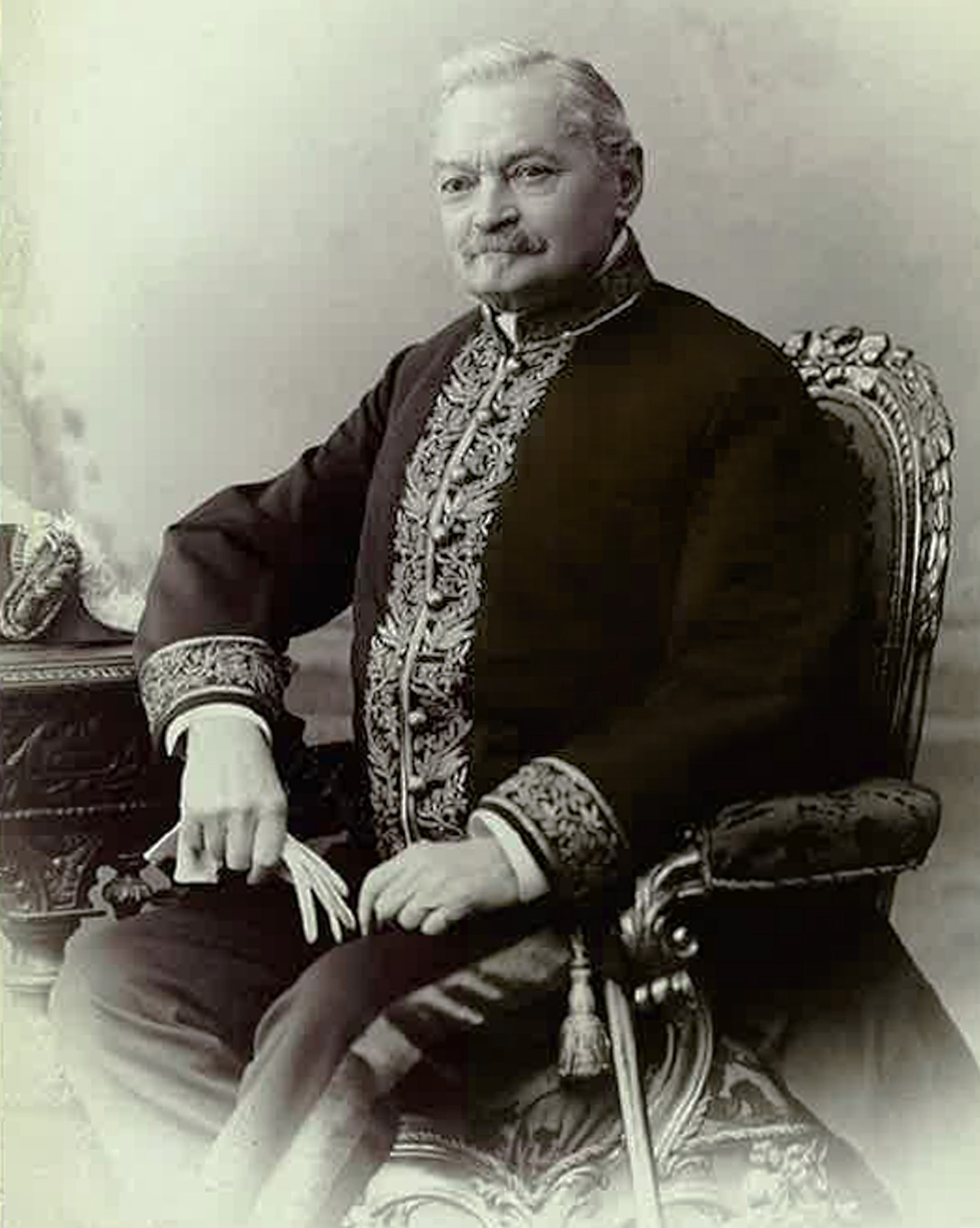 Portrait des St.Galler Staatsmanns Arnold Otto Aepli (1816-1897) als Schweizer Gesandter und Minister in Wien (A) 1883-1893